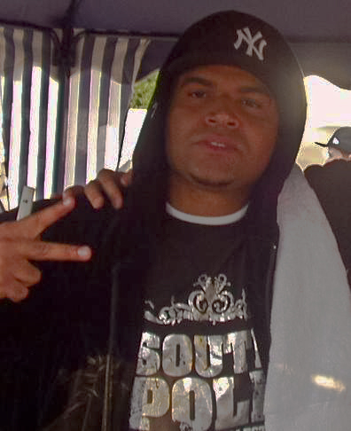 Olli Banjo beim Splash-Festval 2006 in Chemnitz